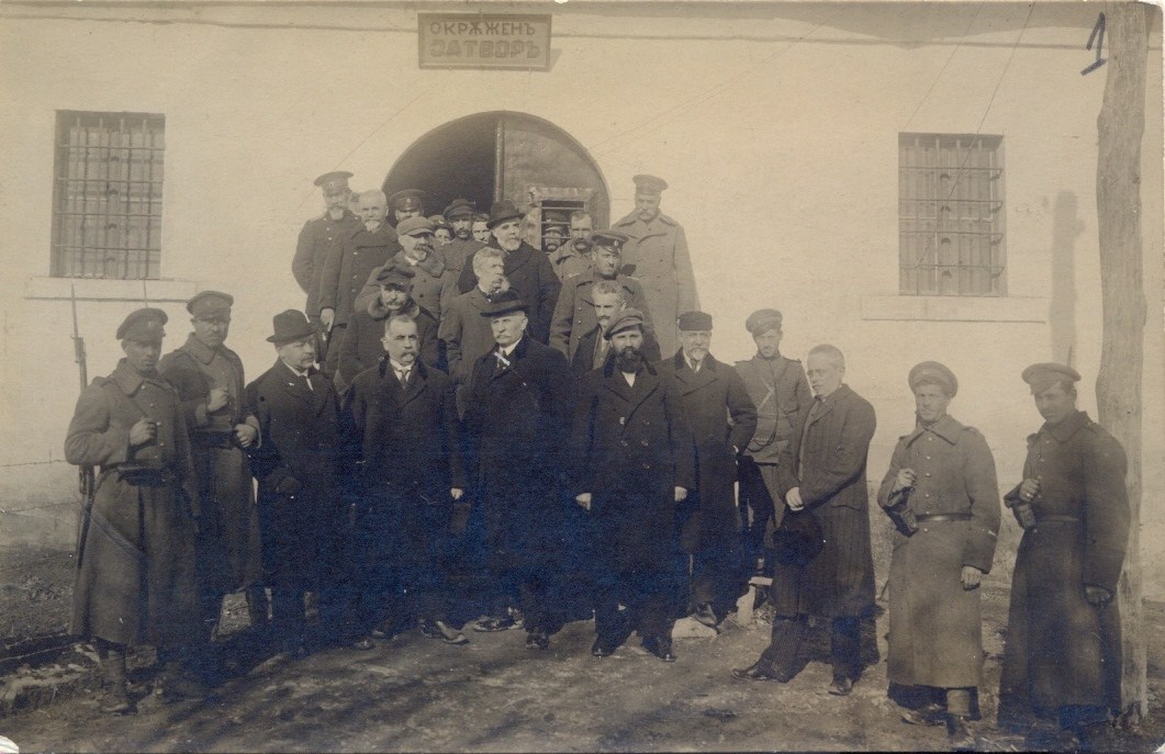 Илюстрована картичка с бившите министри от правителството на Васил Радославов, затворени в Шуменския затвор, 14 февруари 1923 г.